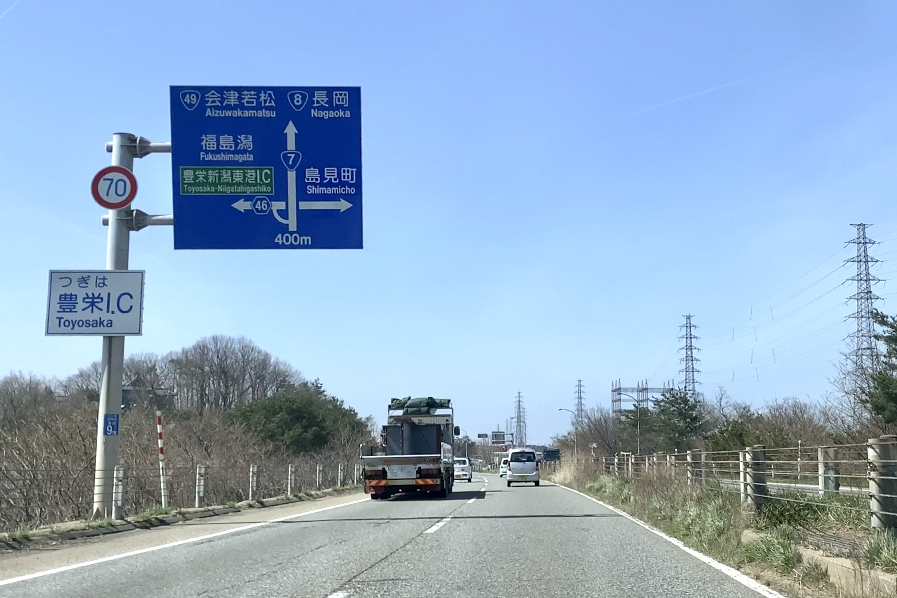 新新バイパス・豊栄インターチェンジ（2020年3月）